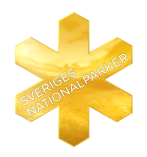 étoile dorée, logo officiel des parcs nationaux suédois